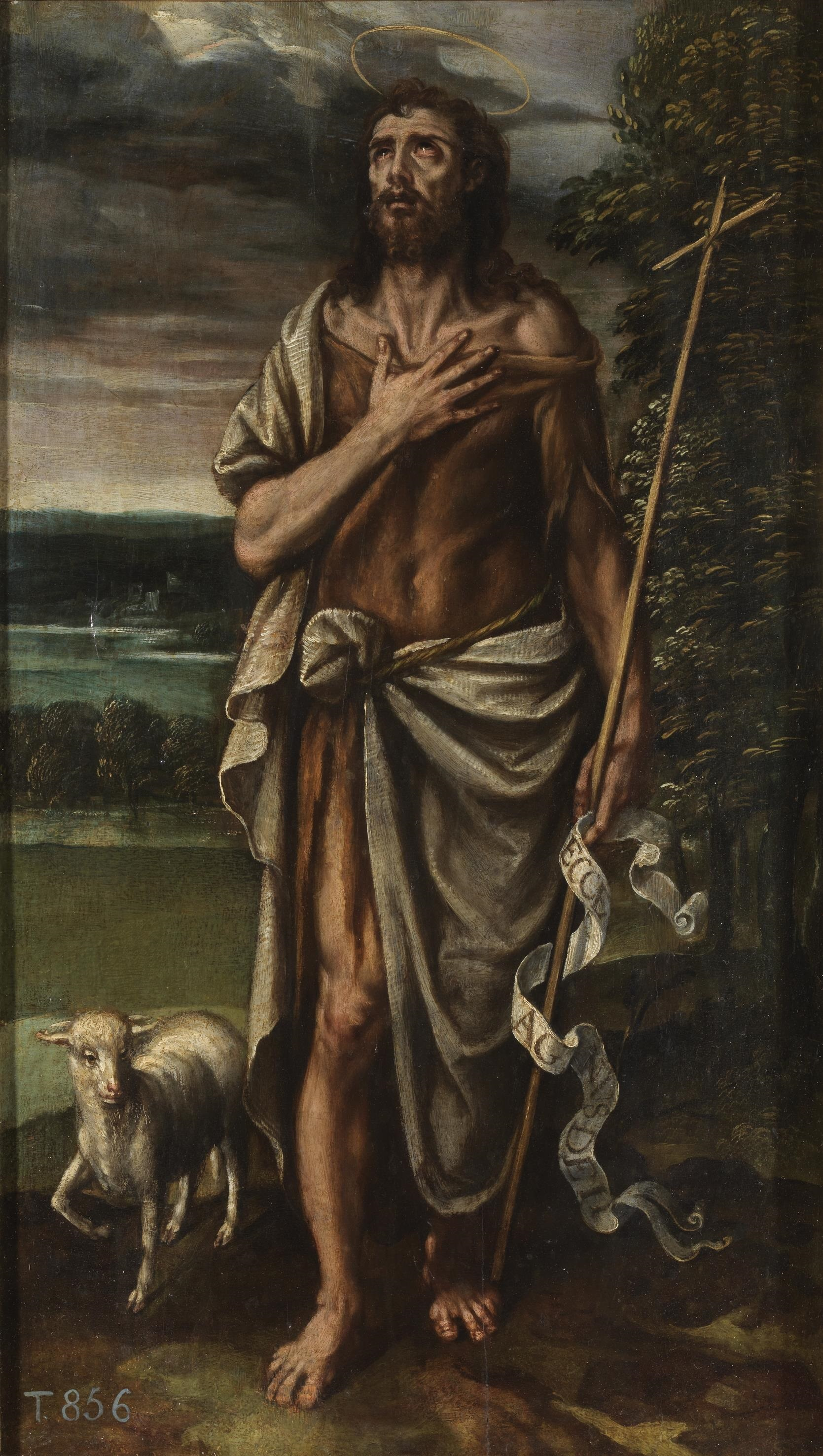 El lienzo representa al profeta San Juan Bautista, precursor del Mesías y decapitado por orden del rey Herodes Antipas.